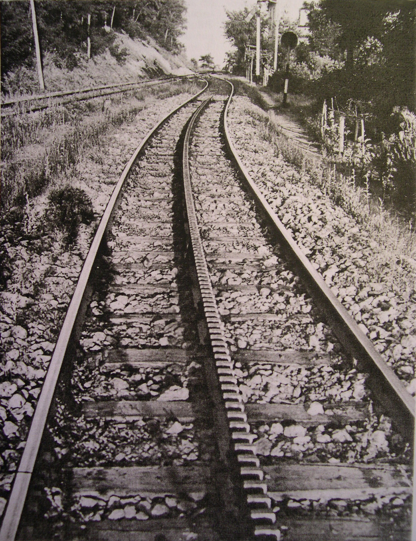 Termine della cremagliera sulla ferrovia Saline-Volterra